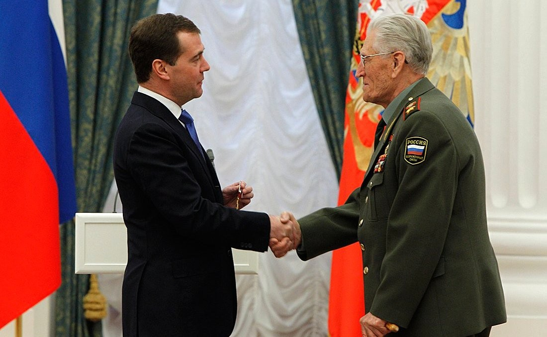 Вручение государственных наград. Орденом Александра Невского награждён Маршал Советского Союза, участник Великой Отечественной войны Василий Иванович Петров